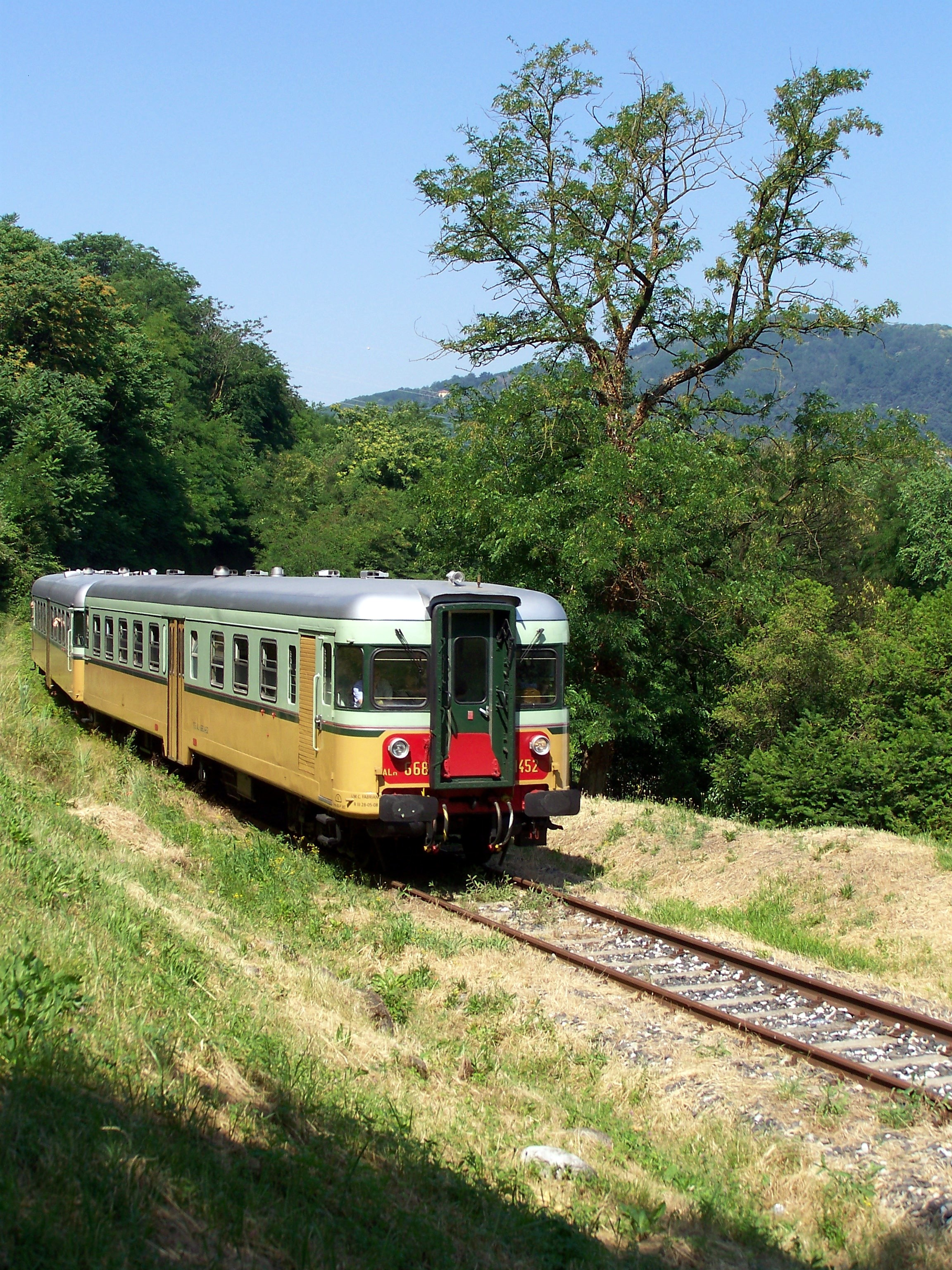 Trenoblu composto da due automotrici ALn 668.1401+ALn 668.1452 in livrea storica ritratto all'uscita della trincea in direzione della fermata di Capriolo.